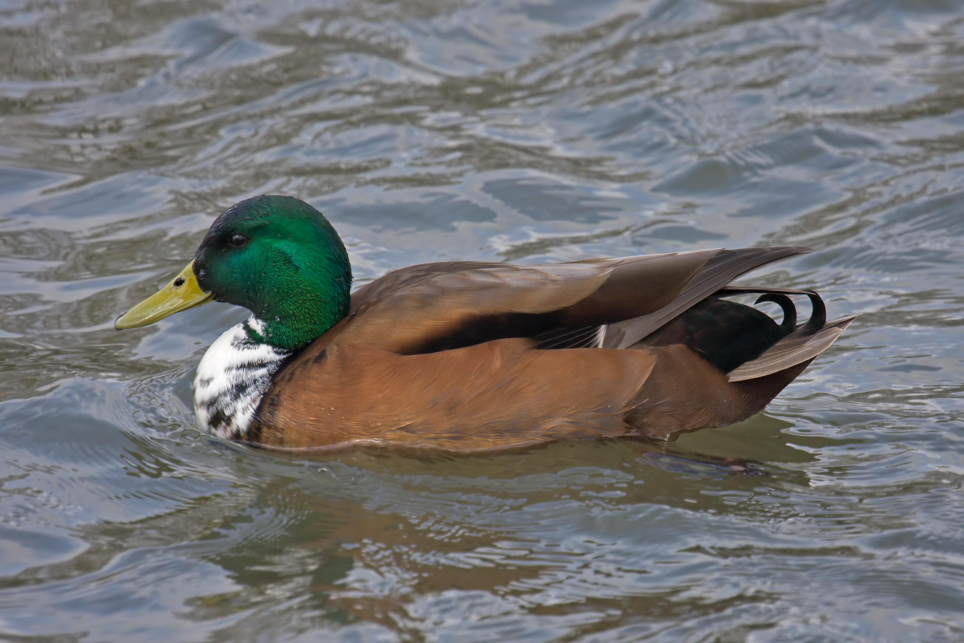 Farbvariante einer männlichen Stockente (Anas platyrhynchos)